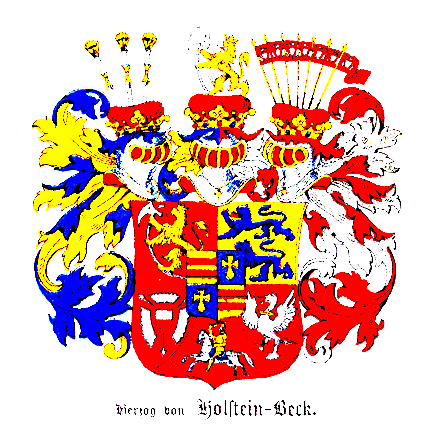 Familienwappen derer Herzog Holstein-Beck